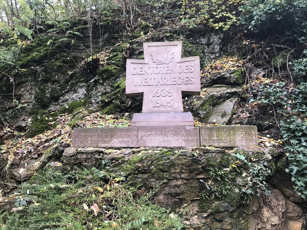 Denkmal (Kreuz) für die im 2. Weltkrieg gefallenen Mitglieder von Vereinen aus Herdern und Zähringen in Freiburg im Breisgau.